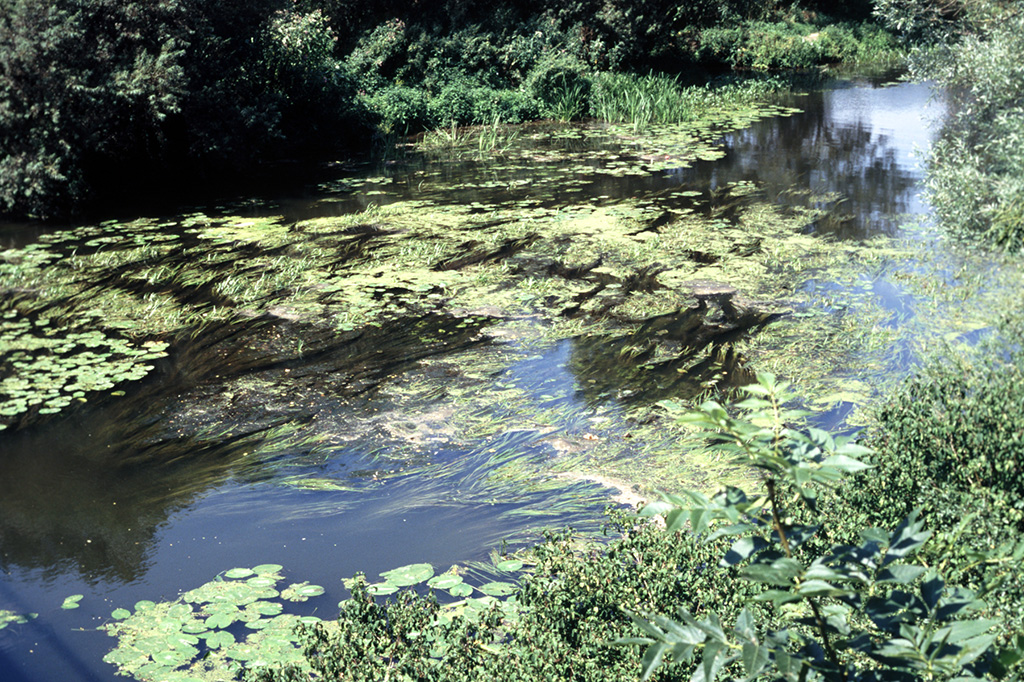 Die junge Saar bei Wolfskirchen (Elsass).